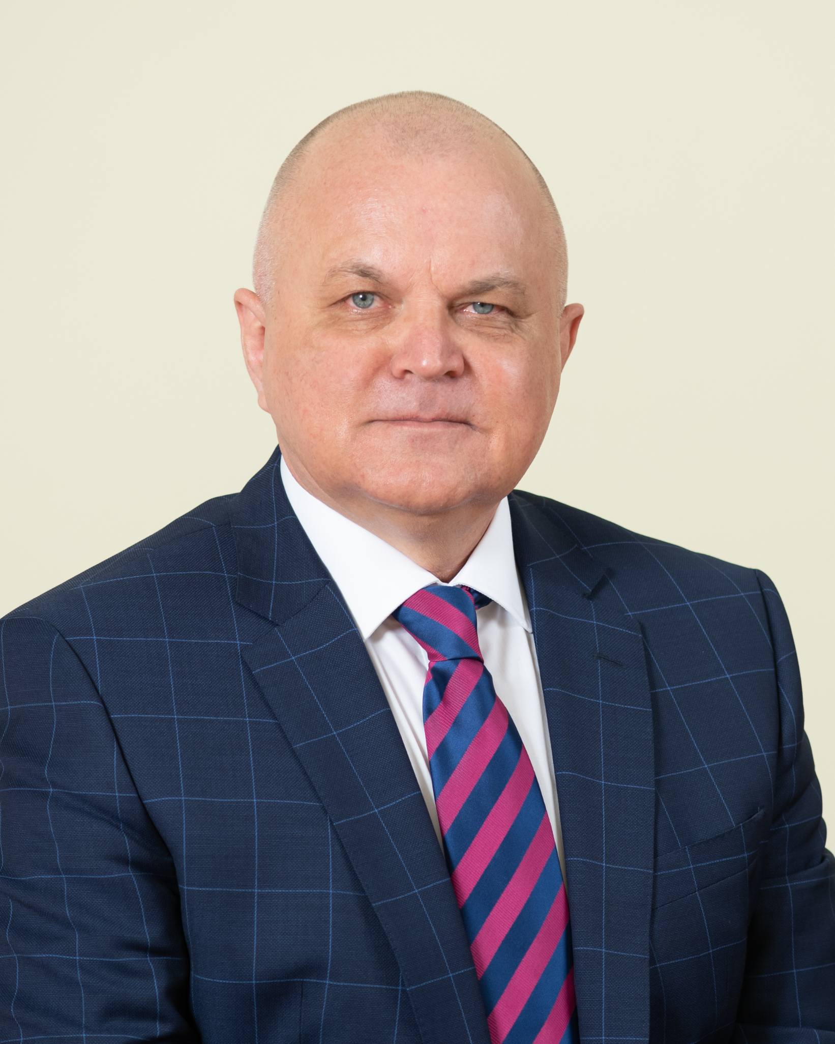 Urmas Reitelmann